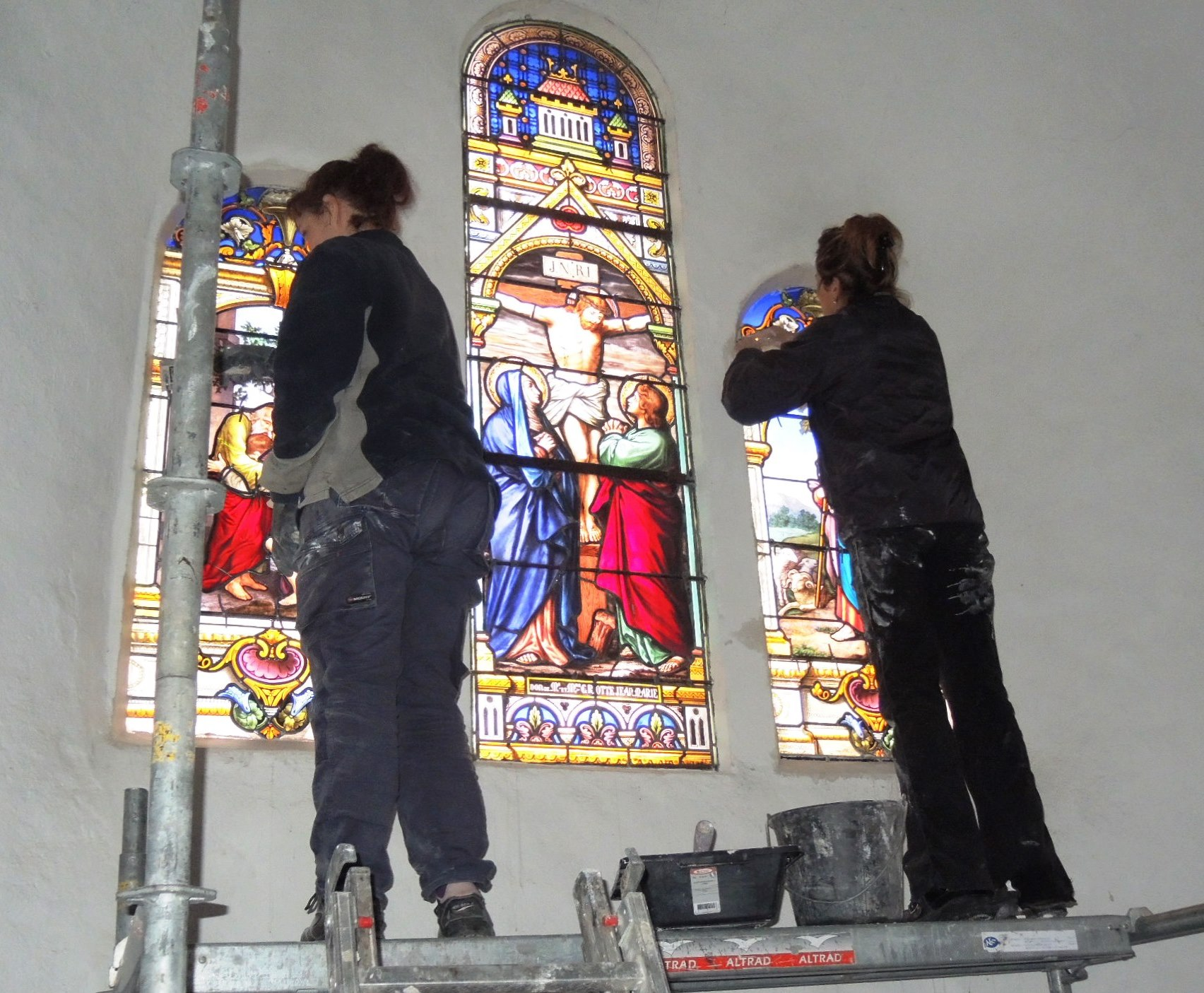 Charnas détail